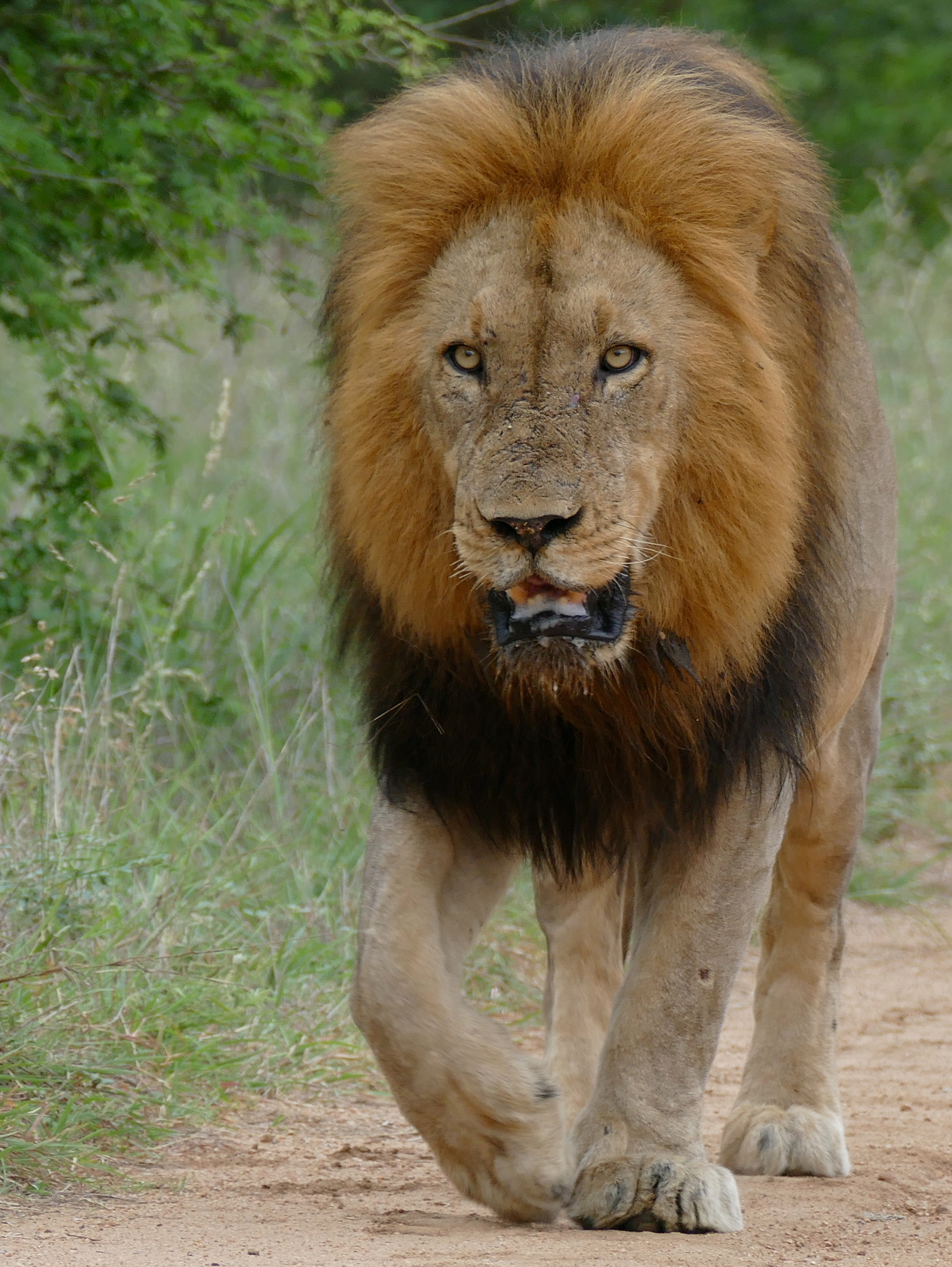 S21 Road West of Lower Sabie, Kruger NP, SOUTH AFRICA